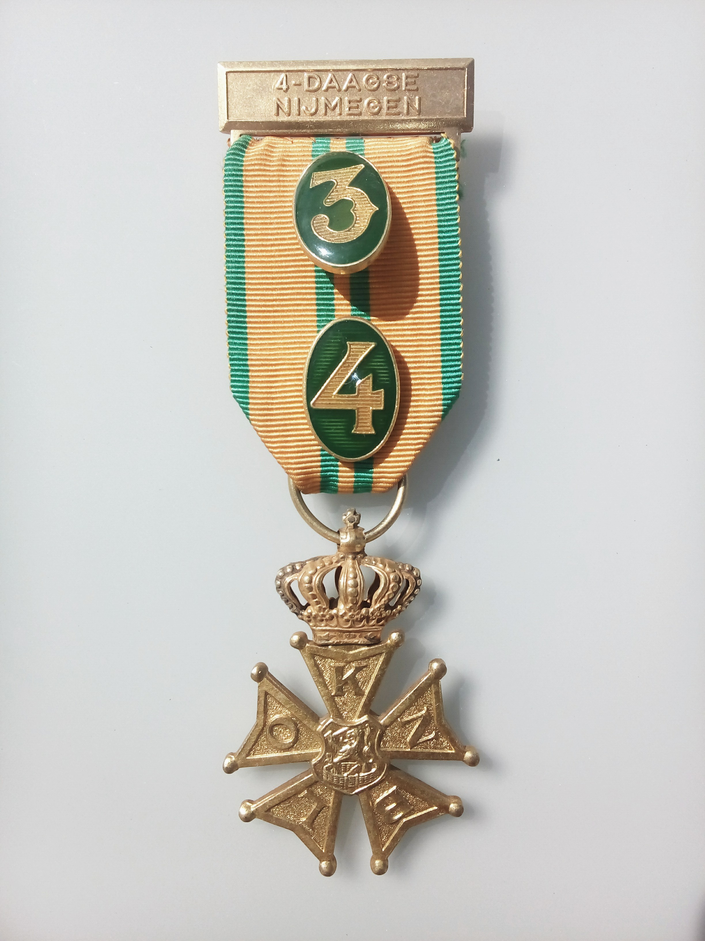 Viertagekreuz (niederl.: Vierdaagsekruis) in Bronze, mit den Zifferschildern für eine 3- bzw. 4-fache Teilnahme